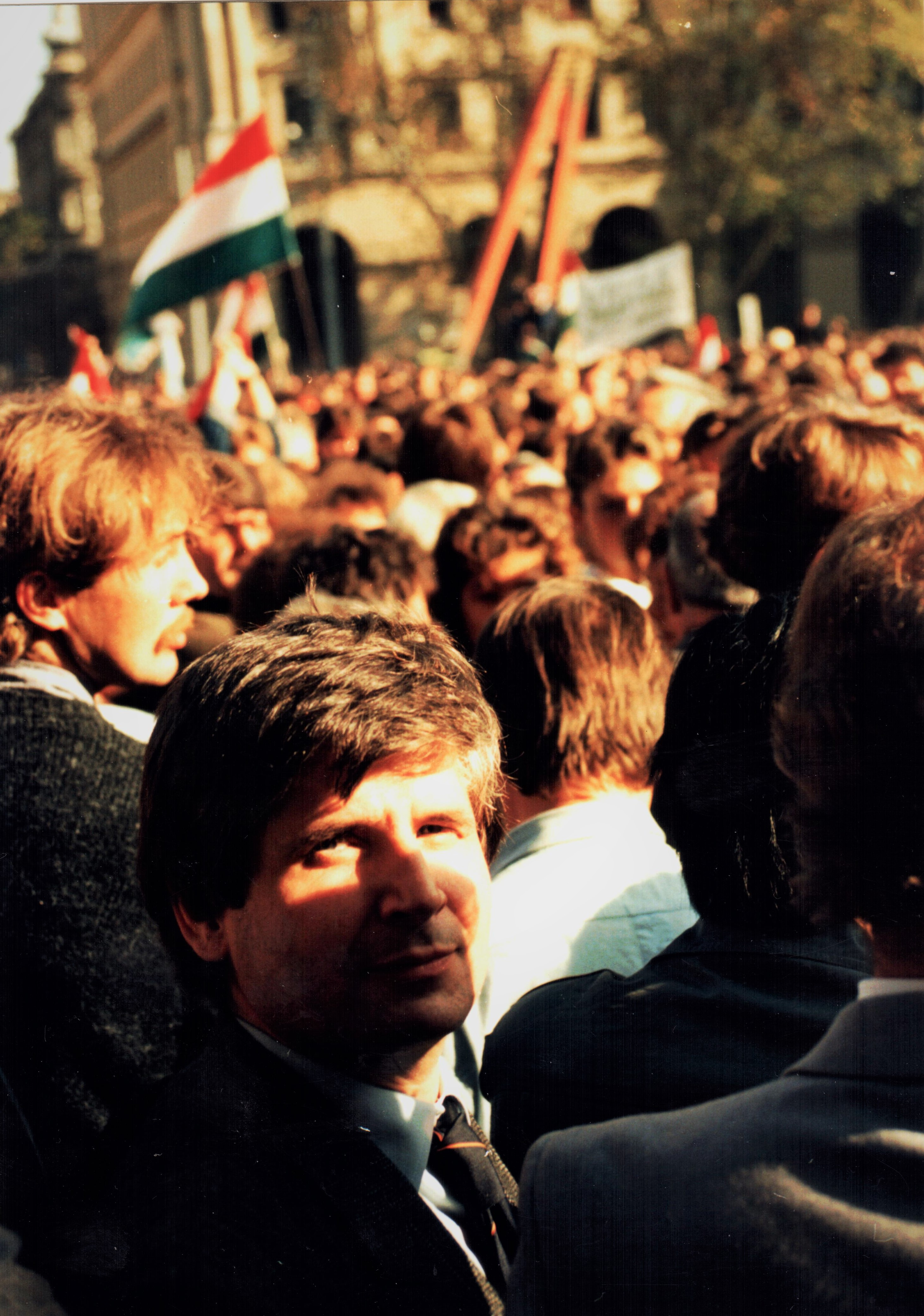 1989. október 23-a a budapesti Kossuth téren: Magyarország Köztársaság!